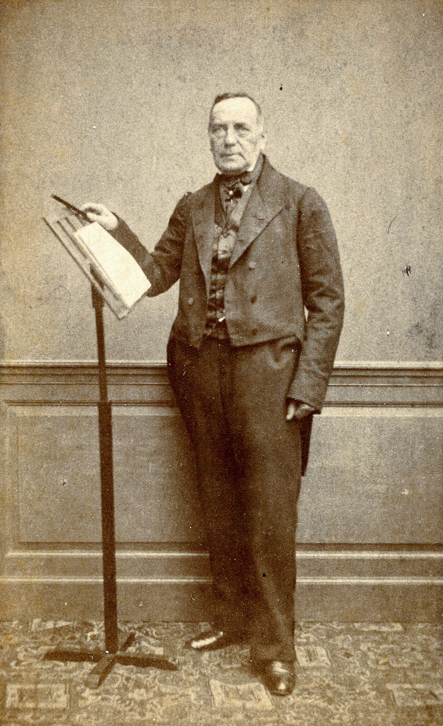 Johann Heinrich Lübeck (1799-1865), was een violist, componist, dirigent en muziekpedagoog, die in 1826 werd aangesteld als eerste directeur van het Koninklijk Conservatorium in Den Haag.